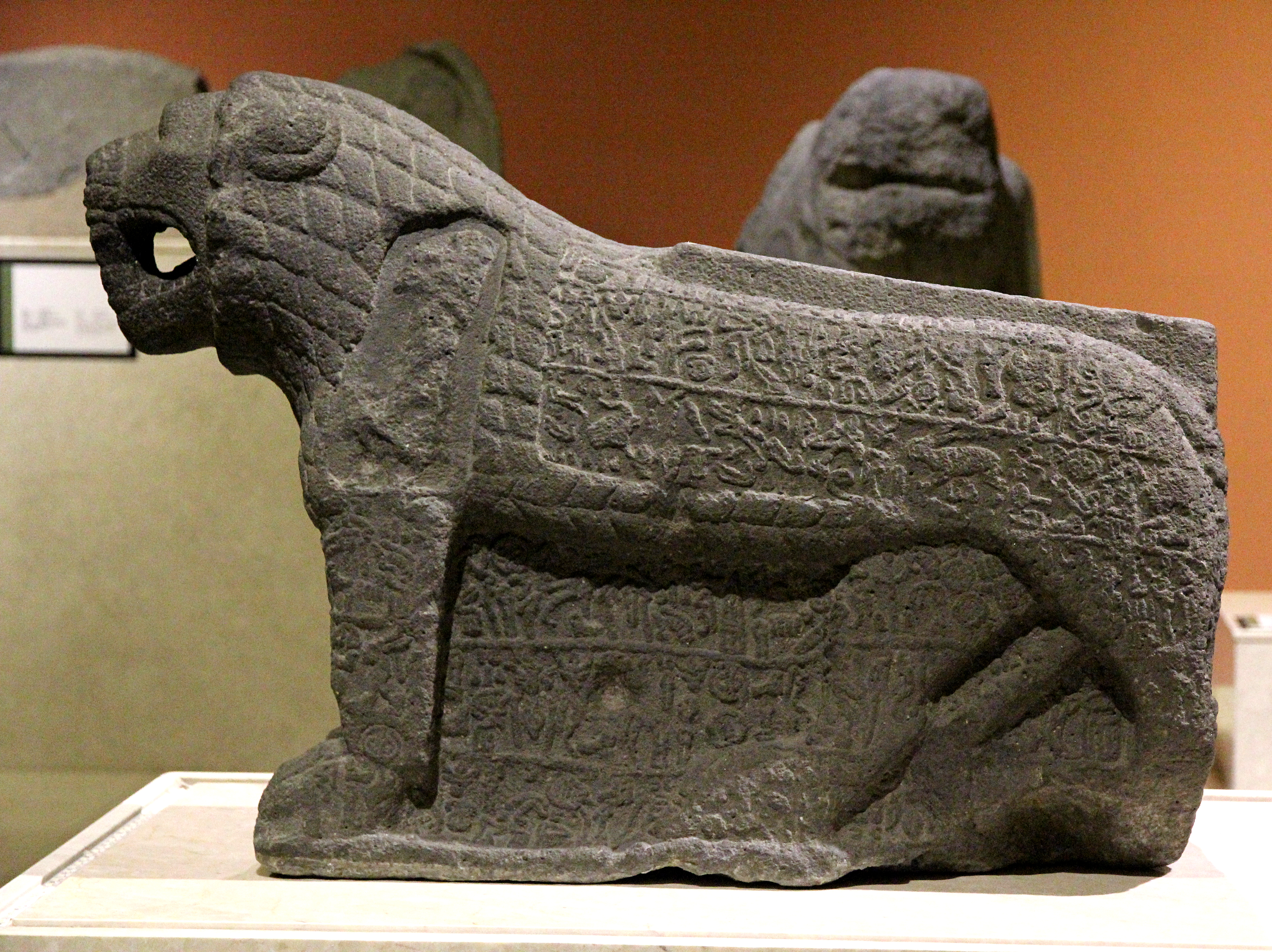 Archäologisches Museum Kahramanmaraş, Türkei, späthethitischer Portallöwe mit Inschrift aus der Zitadelle von Kahramanmaraş